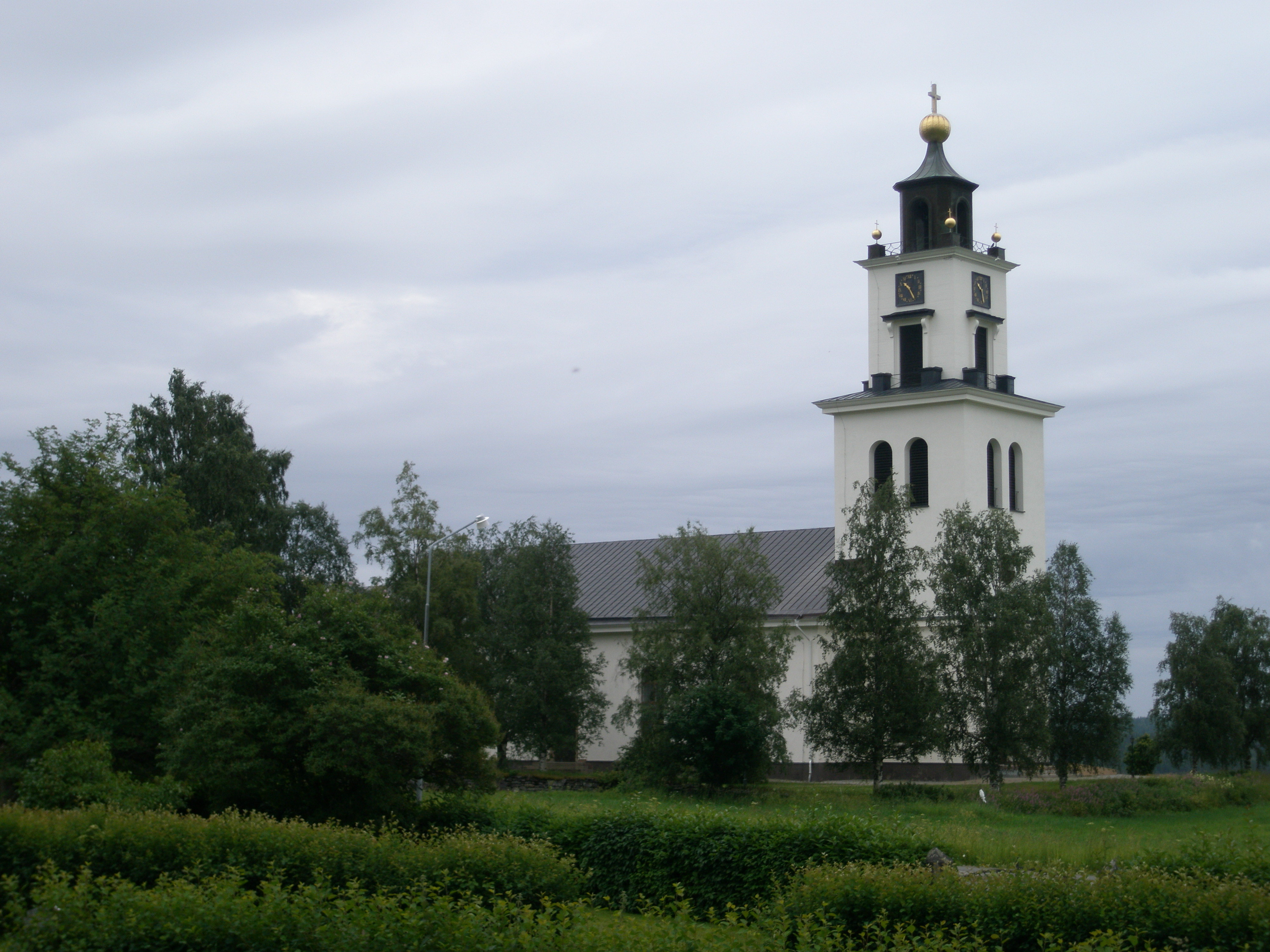 Alsens kyrka, Krokoms kommun, Jämtland, Sverige.